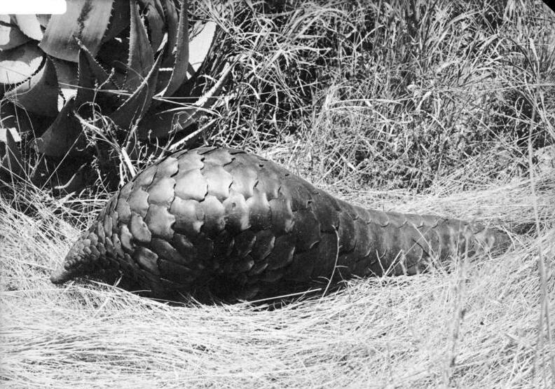 Gürteltier